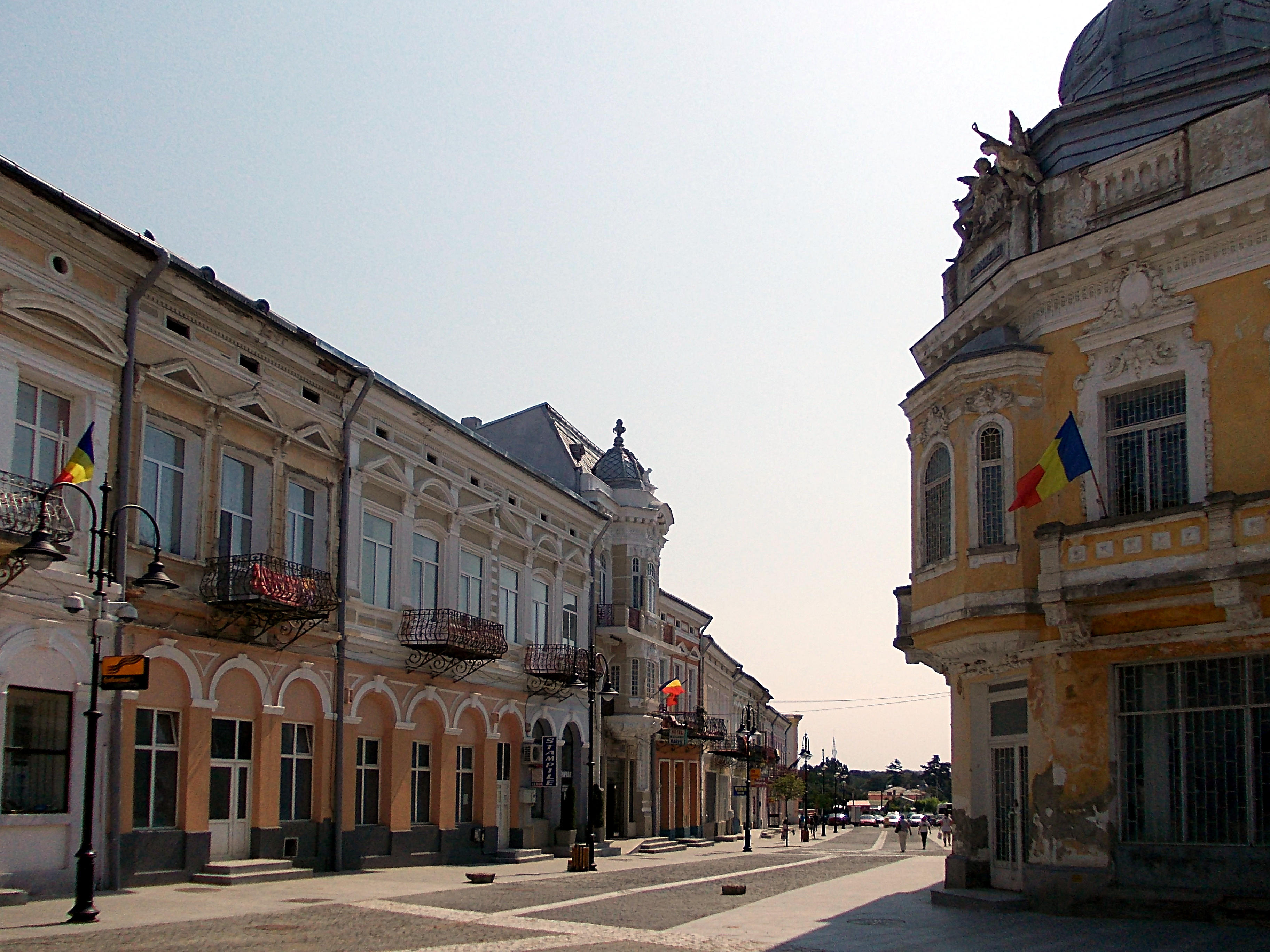 Centru vechi din Botoşani